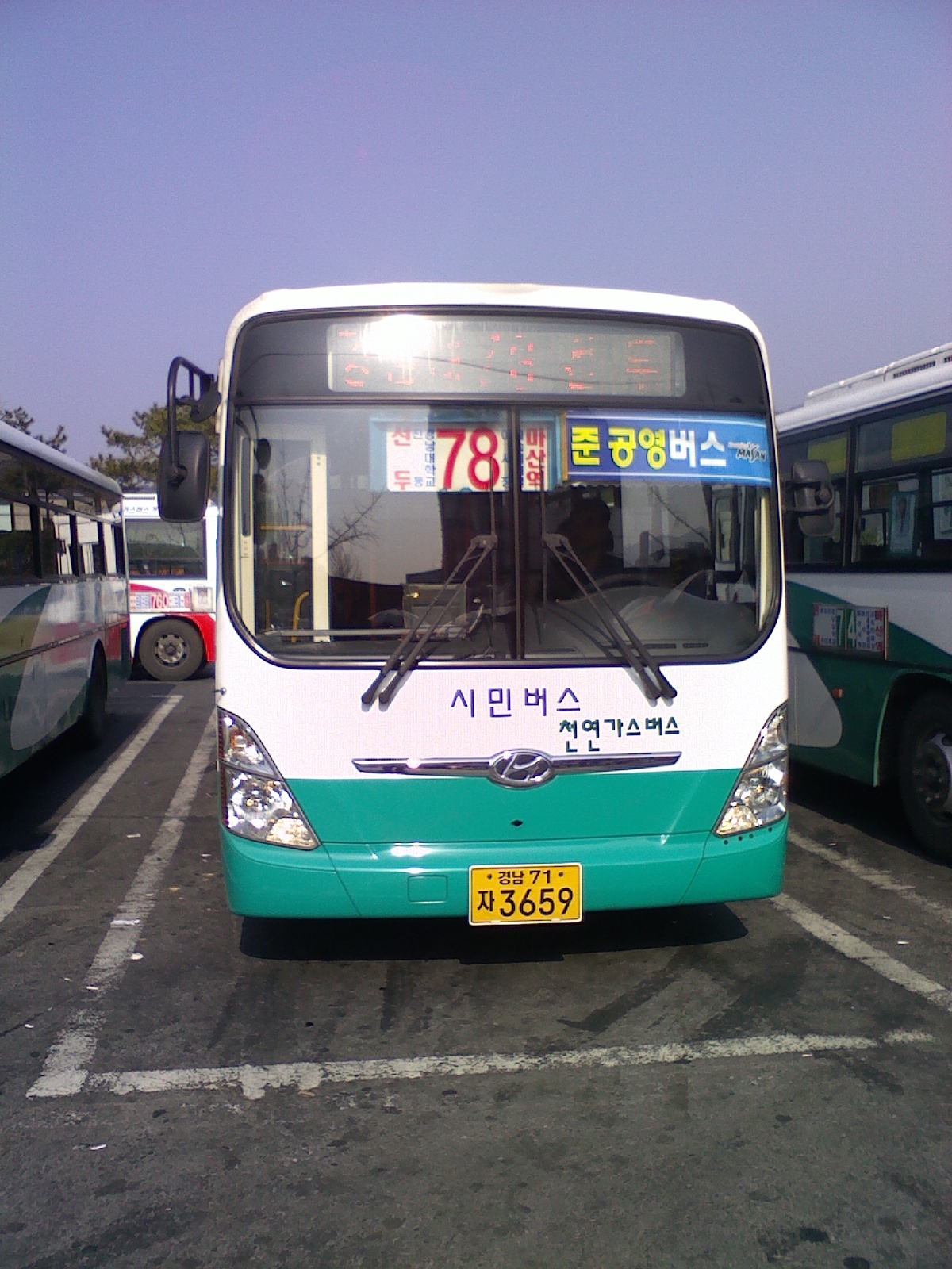 마산역과 창원시 마산합포구 진동면을 오가는 시민버스 소속 78번 버스. 마산역